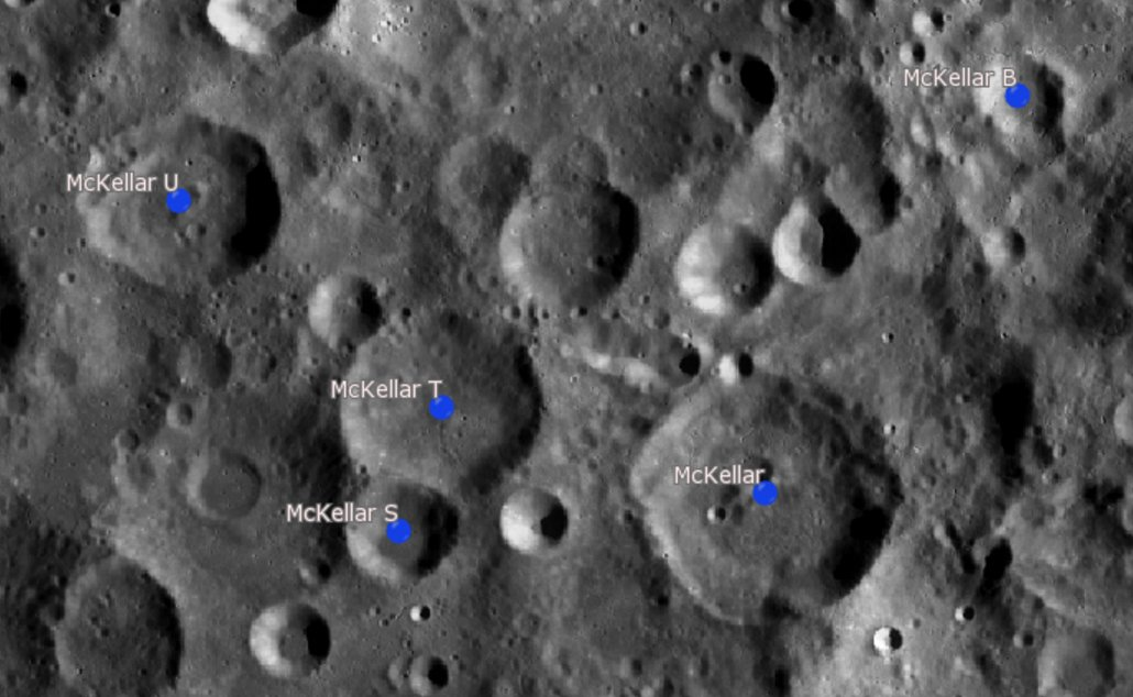 Cráter lunar McKellar. Cráteres satélite. (Imagen LRO)